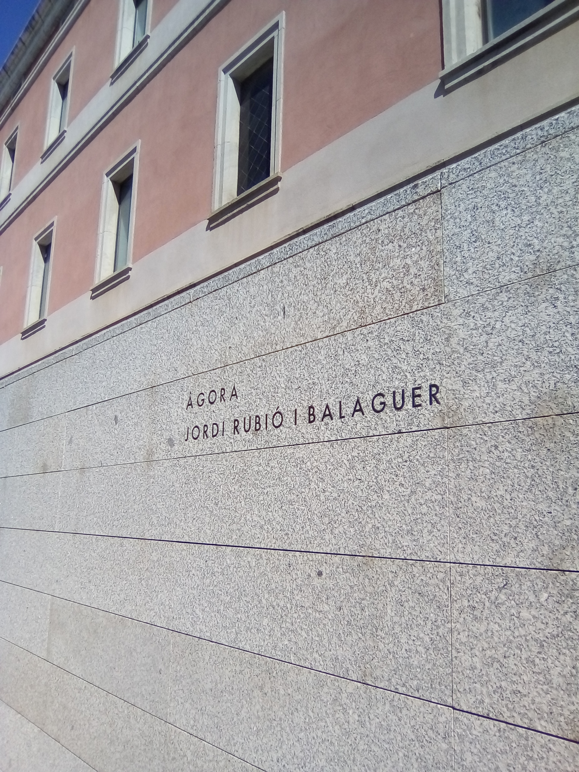 Àgora de la U Pompeu Fabra dedicada a Rubió i Balaguer